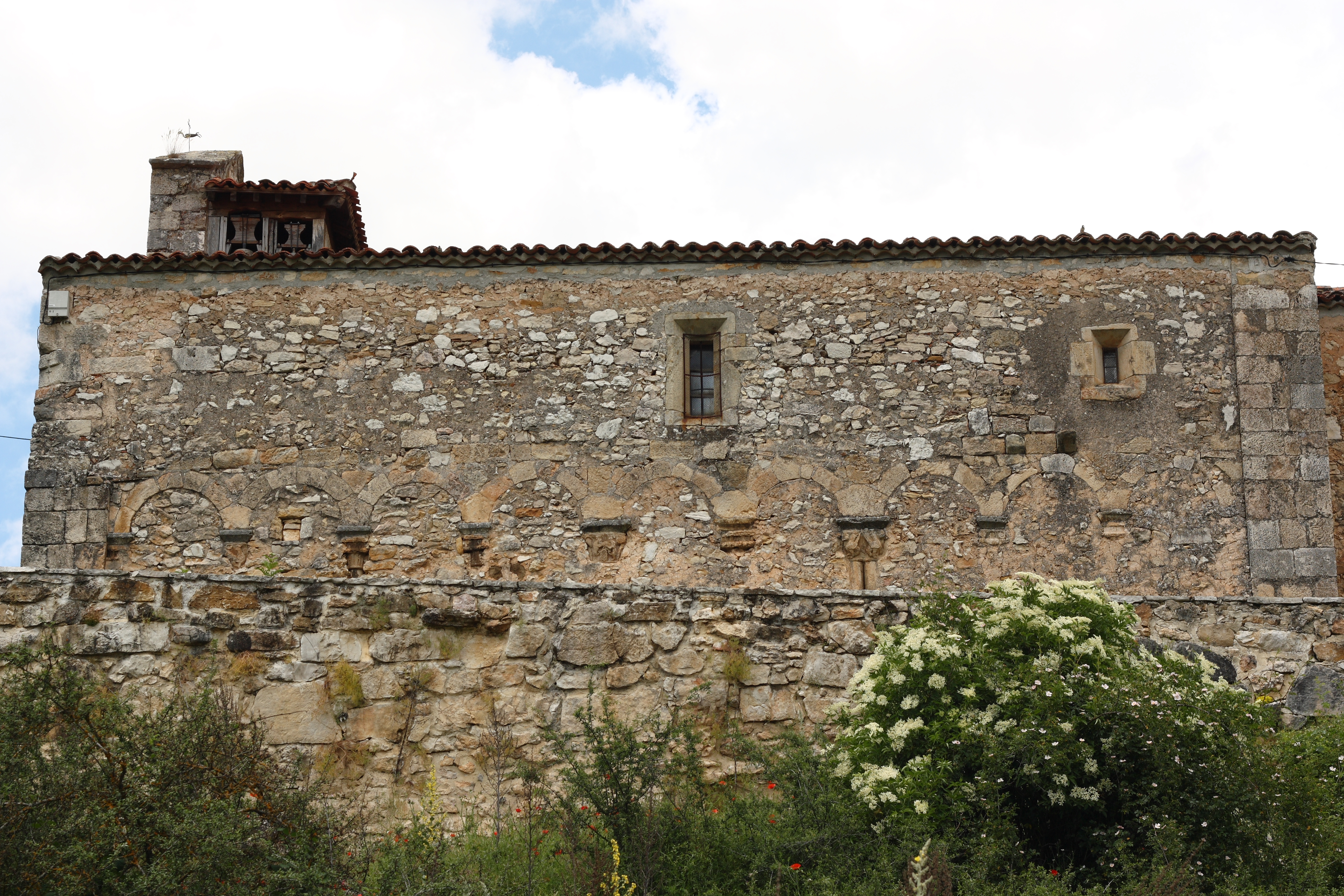 Katholische Kirche Iglesia de la Degollación de San Juan Bautista (Enthauptung des Johannes des Täufers) in Arganza (Soria) in der spanischen Provinz Soria (Castilla y León) (Iglesia de la Degollación de San Juan Bautista Círculo Románico)